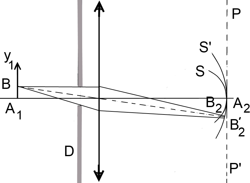 Schemă pentru înţelegerea astigmatismului